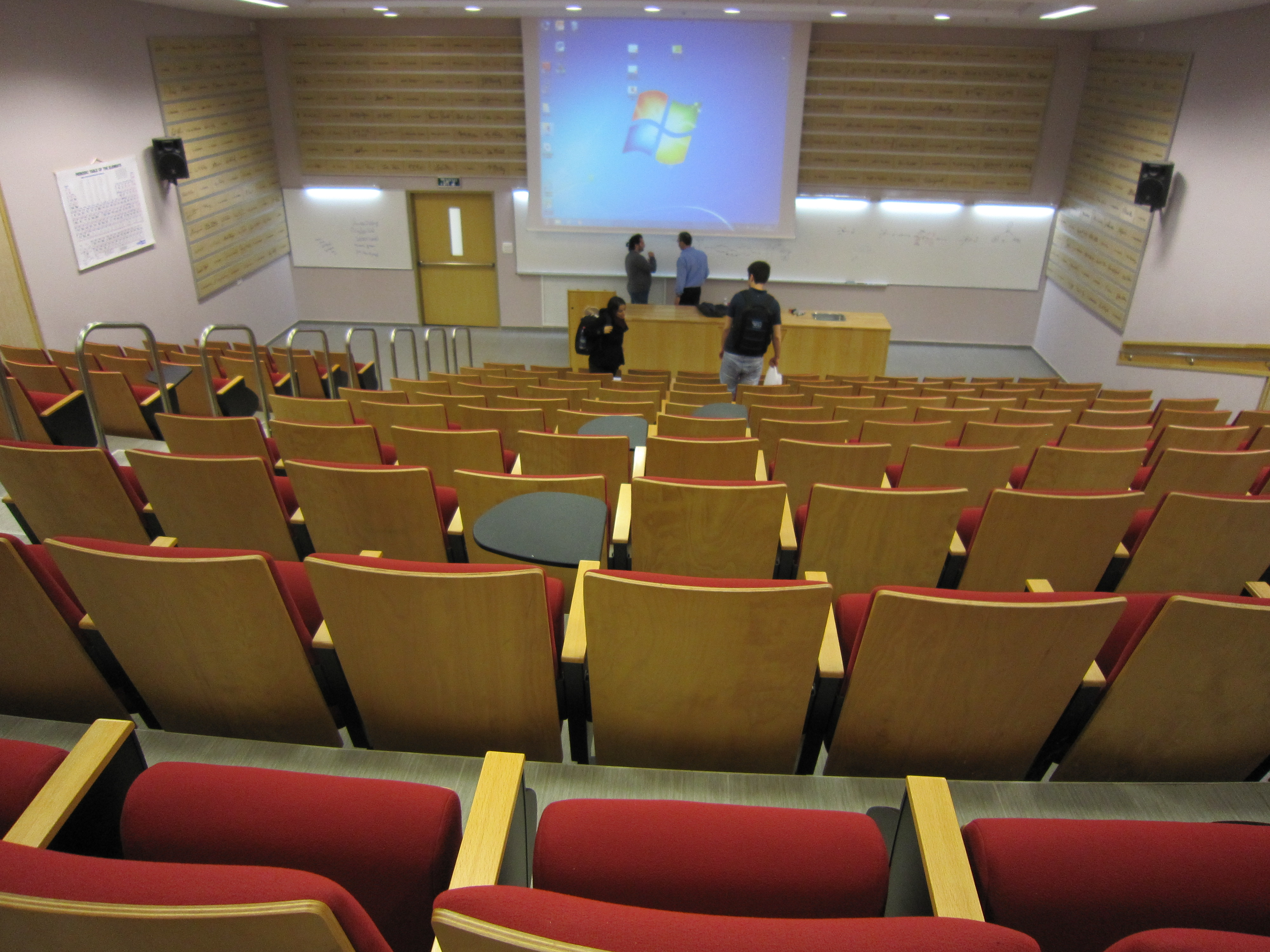 הפקולטה לכימיה בטכניון